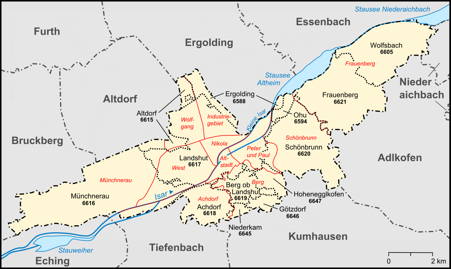 Karte der Gemarkungen mit Gemarkungsnummern (schwarz), Stadtteile (rot) und der Umlandgemeinden von Landshut